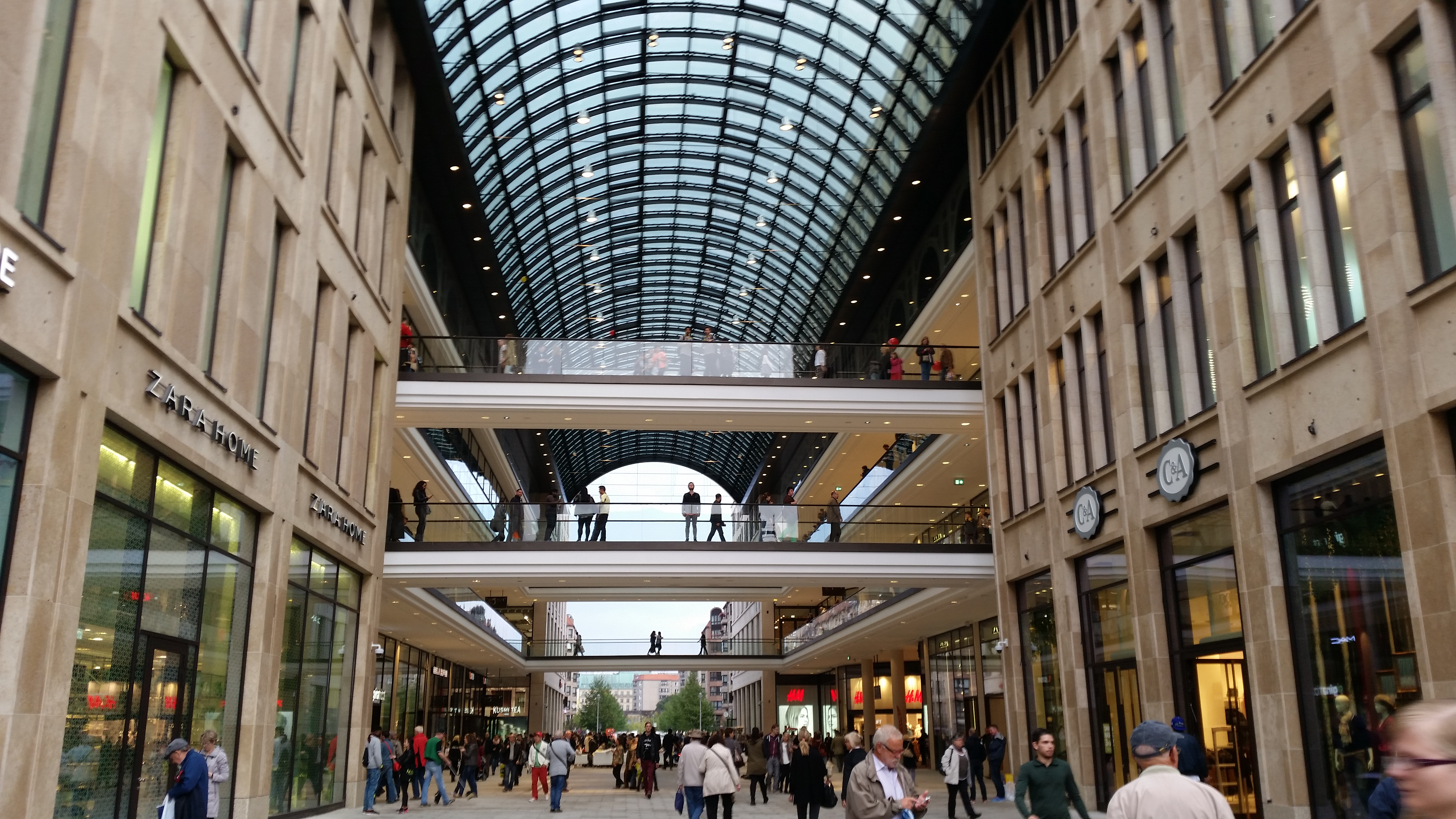 LP12 Mall of Berlin - Eingang Bundesrat